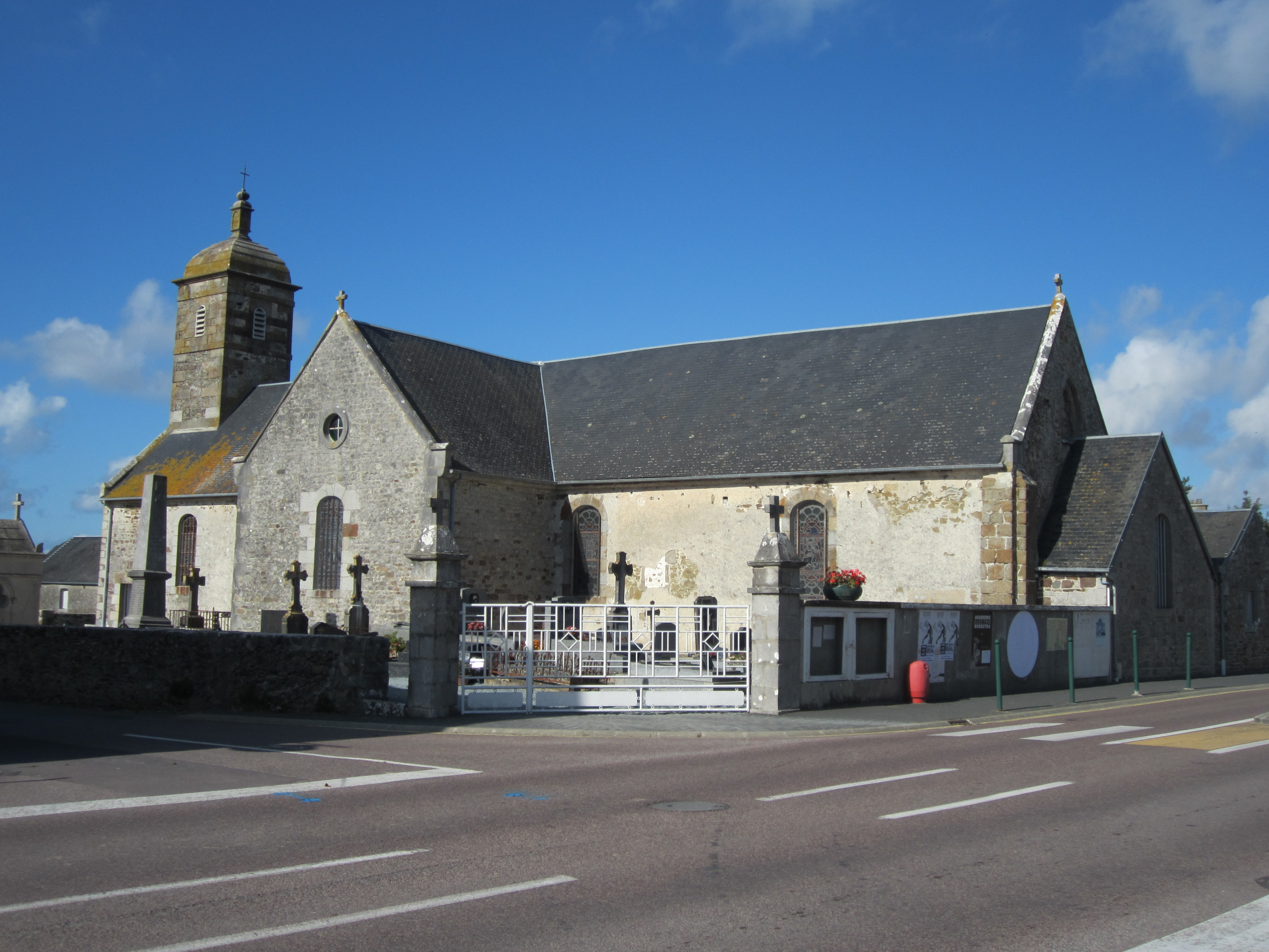 Annoville, Manche